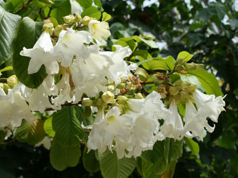 Beaumontia grandiflora